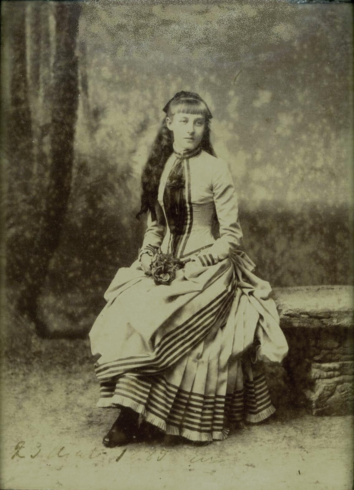 Hélène_d'Orléans photographie dédicacée à Antonia Bouchot, Eu.